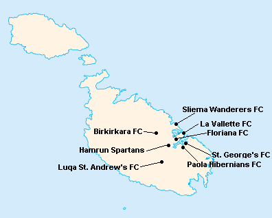 Répartition des clubs en First Division Maltaise 1949-1950.